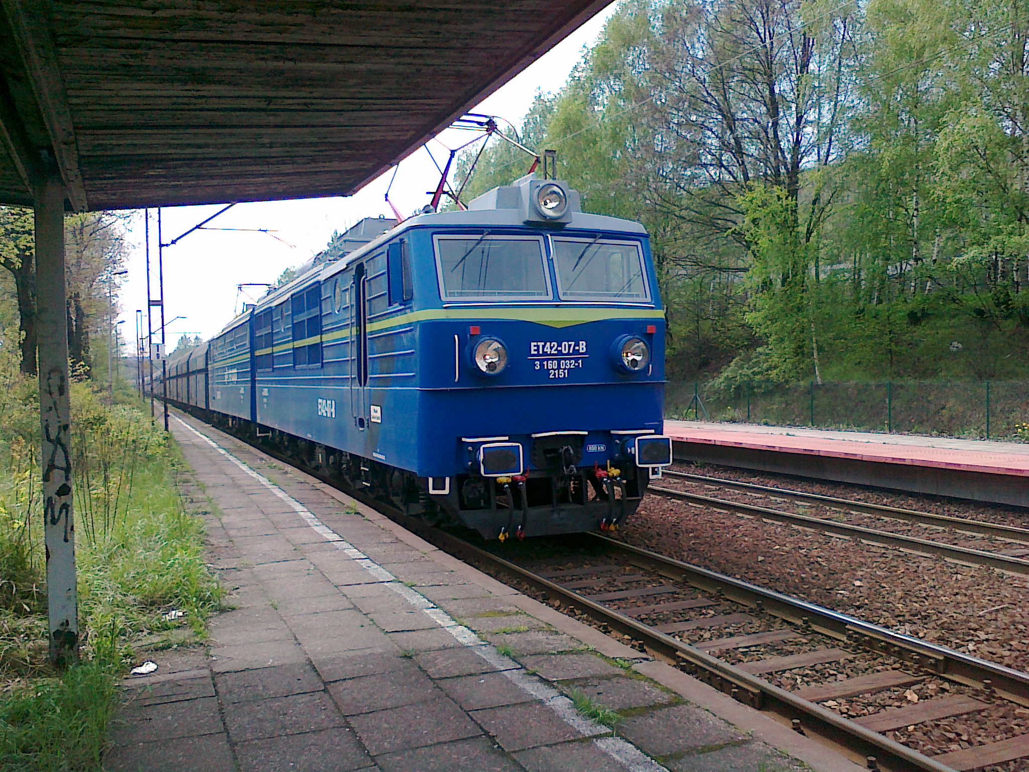 ET42-07 przejeżdzająca przez przystanek kolejowy Rybnik Rymer